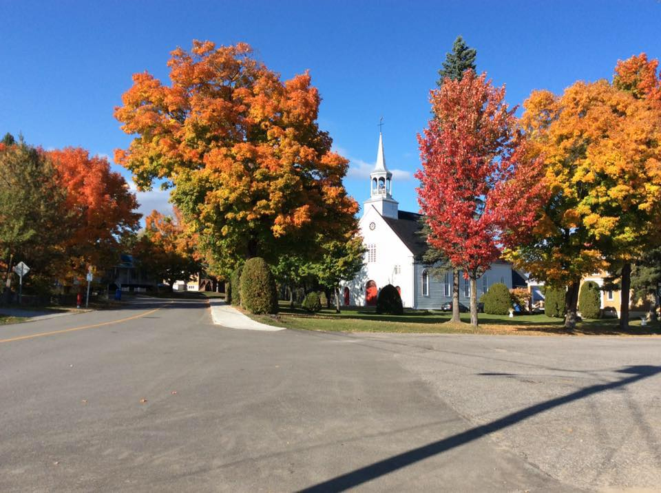 Église de Saint-Alphonse-Rodriguez